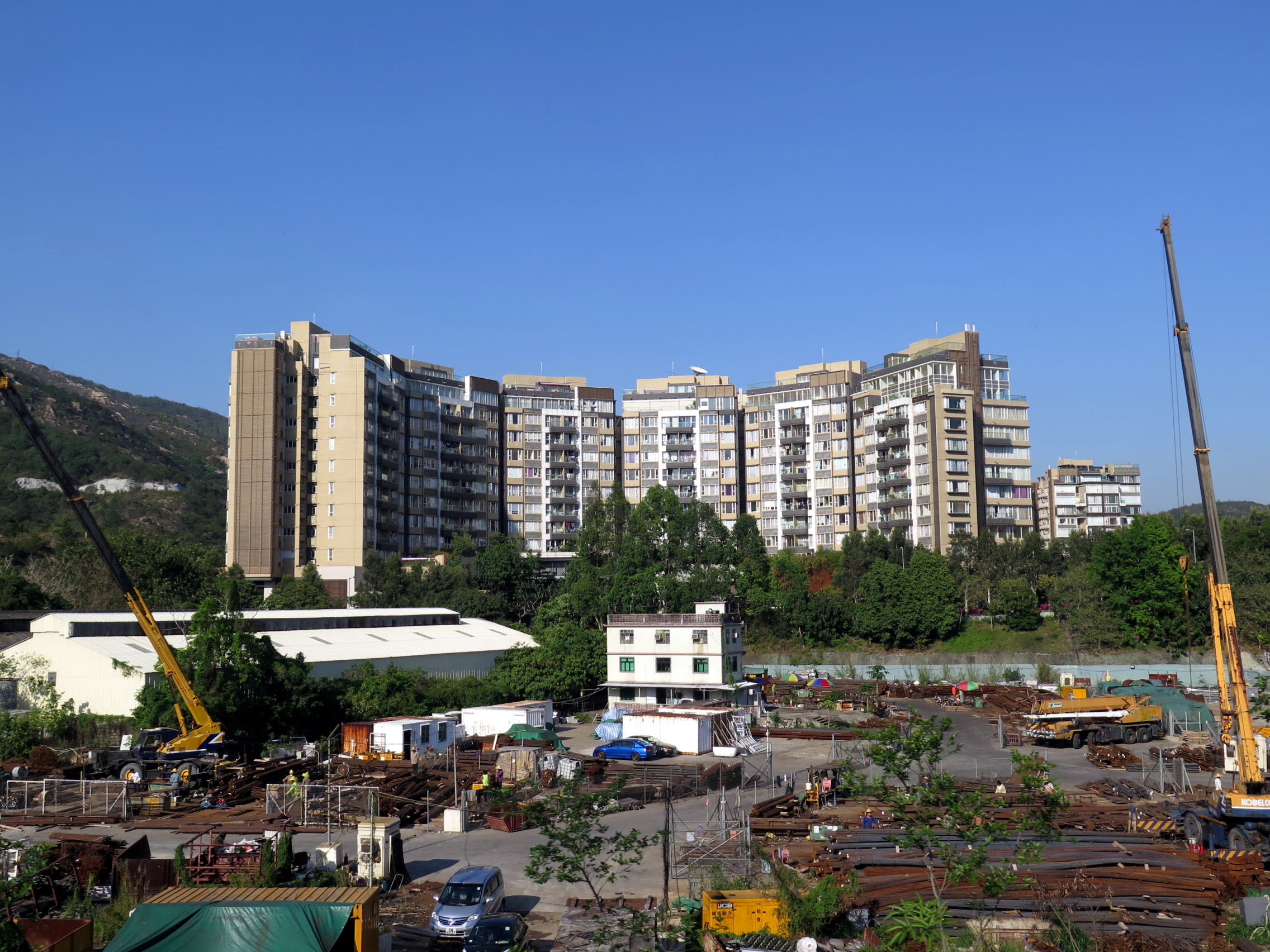 Avignon, Tuen Mun